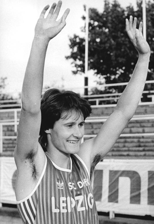 Läuferin Kerstin Behrendt ADN-Friedrich Gahlbeck 18.8.90 Dresden: 41. Leichtathletik-Meisterschaften- Den Sprint der Frauen über 100 Meter gewann Kerstin Behrendt vom SC DHfK Leipzig in 11,17 s und wurde damit letzte DDR-Meisterin in dieser Disziplin. Abgebildete Personen: Behrendt, Kerstin: Leichtathletin, Läuferin, DDR